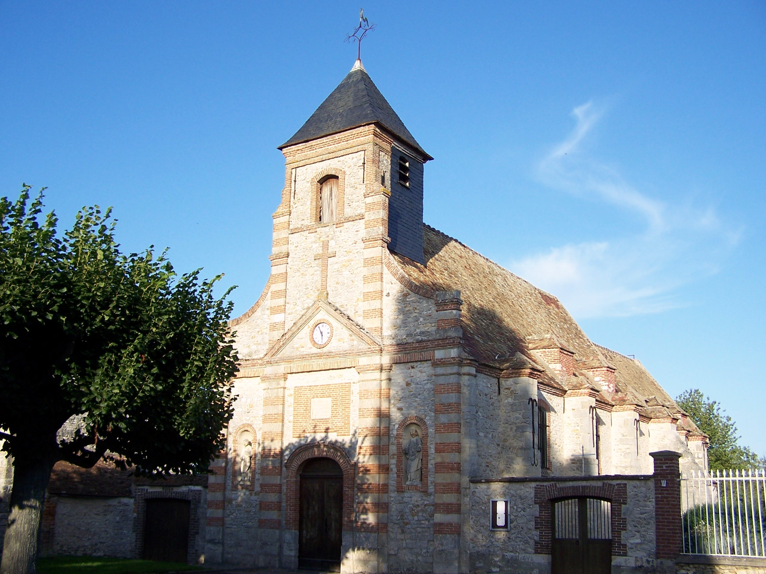 Église Saint-Pierre-et-Saint-Paul de Saulx-Marchais (Yvelines, France)